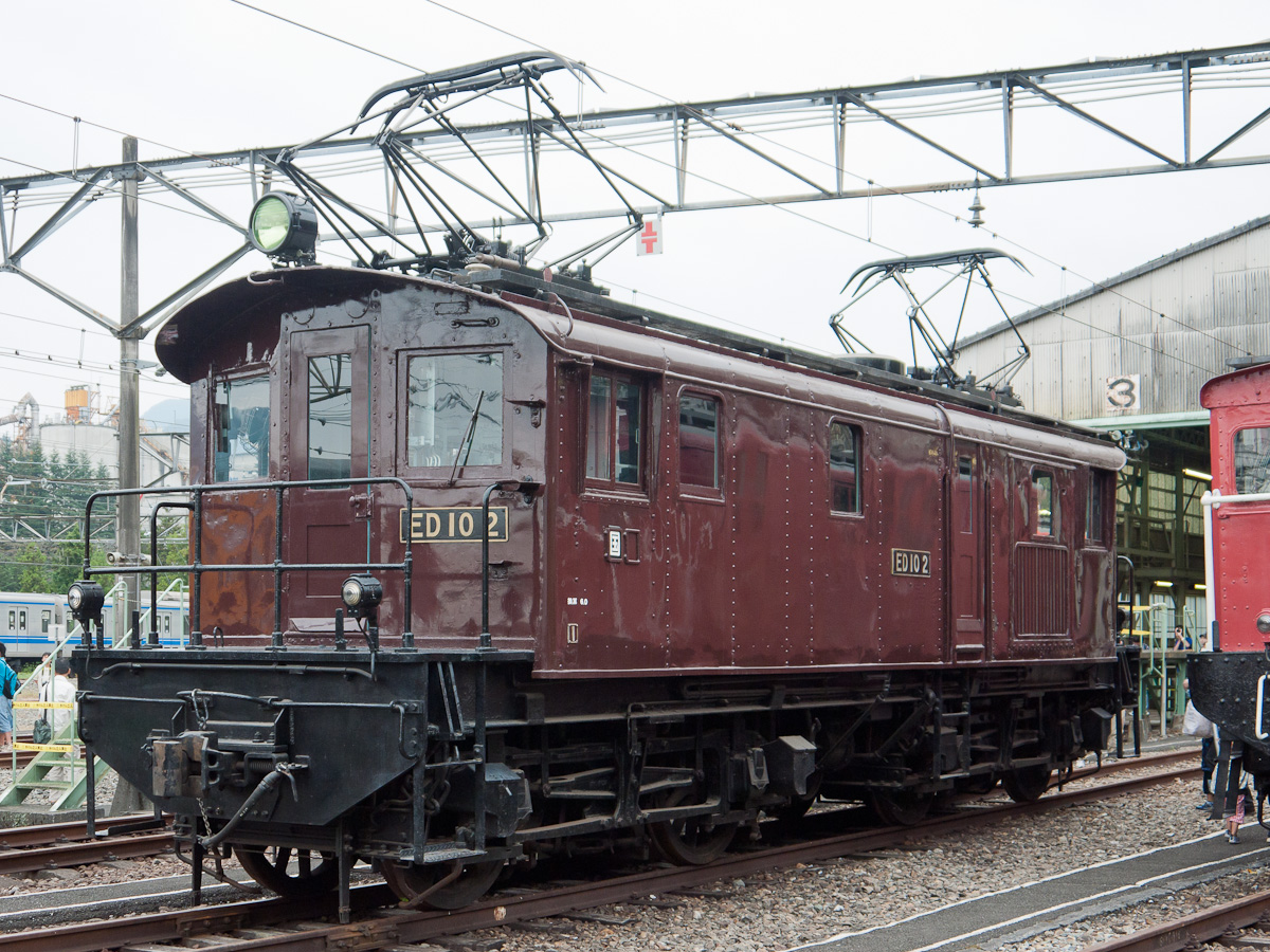 西武鉄道E71（ED102）、横瀬車両基地の保存車。